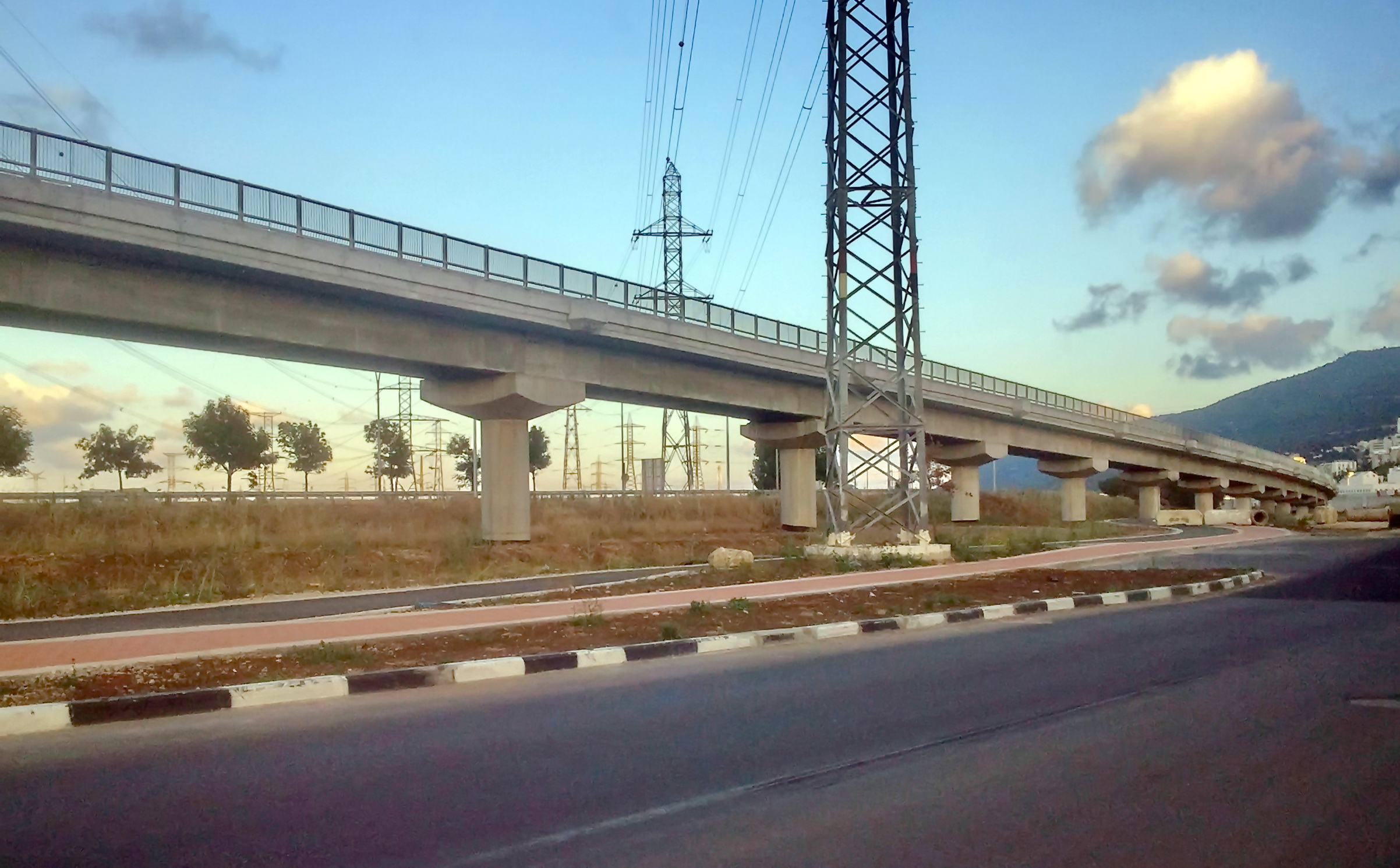 גשר מסילת רכבת העמק החדש באזור הצ'ק פוסט באזור רחובות הנפח והמשביר. ברקע מימין בתי העיר נשר